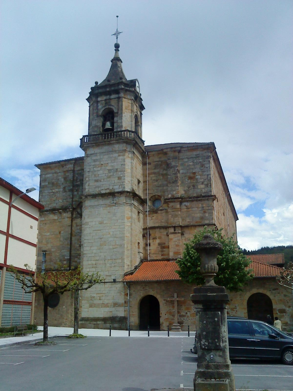 Iglesia de San Torcuato de Abadiño en Bizkaia, País Vasco (España)